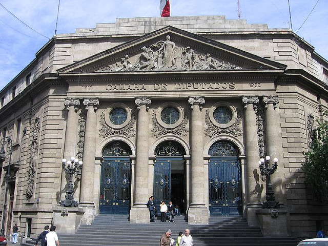 Asamblea Legislativa del Distrito Federal Ciudad de México.